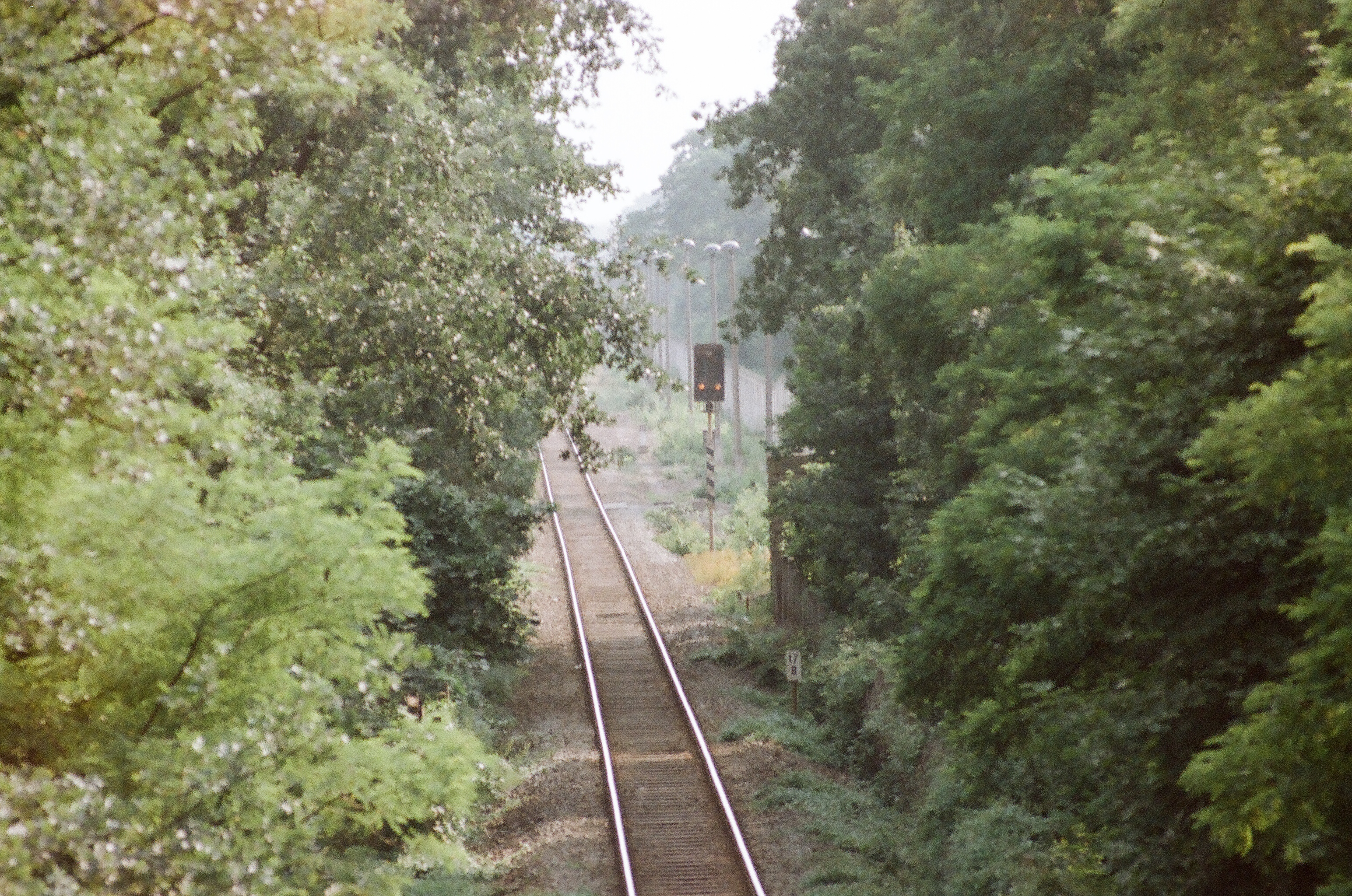 Die Eisenbahnlinie durch die Exklave Steinstücken in Berlin